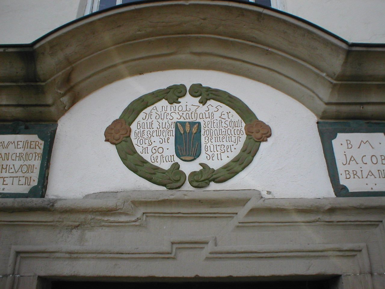 Portal des alten Rathauses in Stebbach